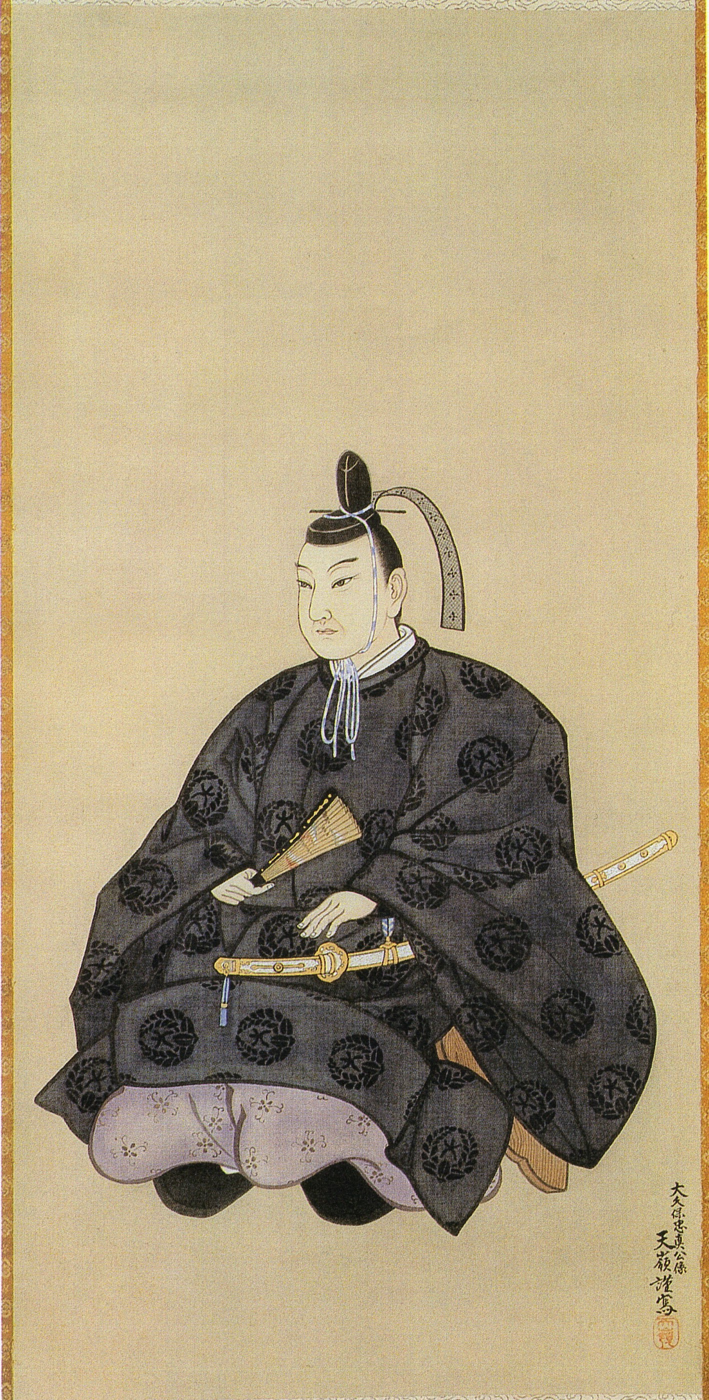 相模小田原藩主・大久保忠真の肖像画。